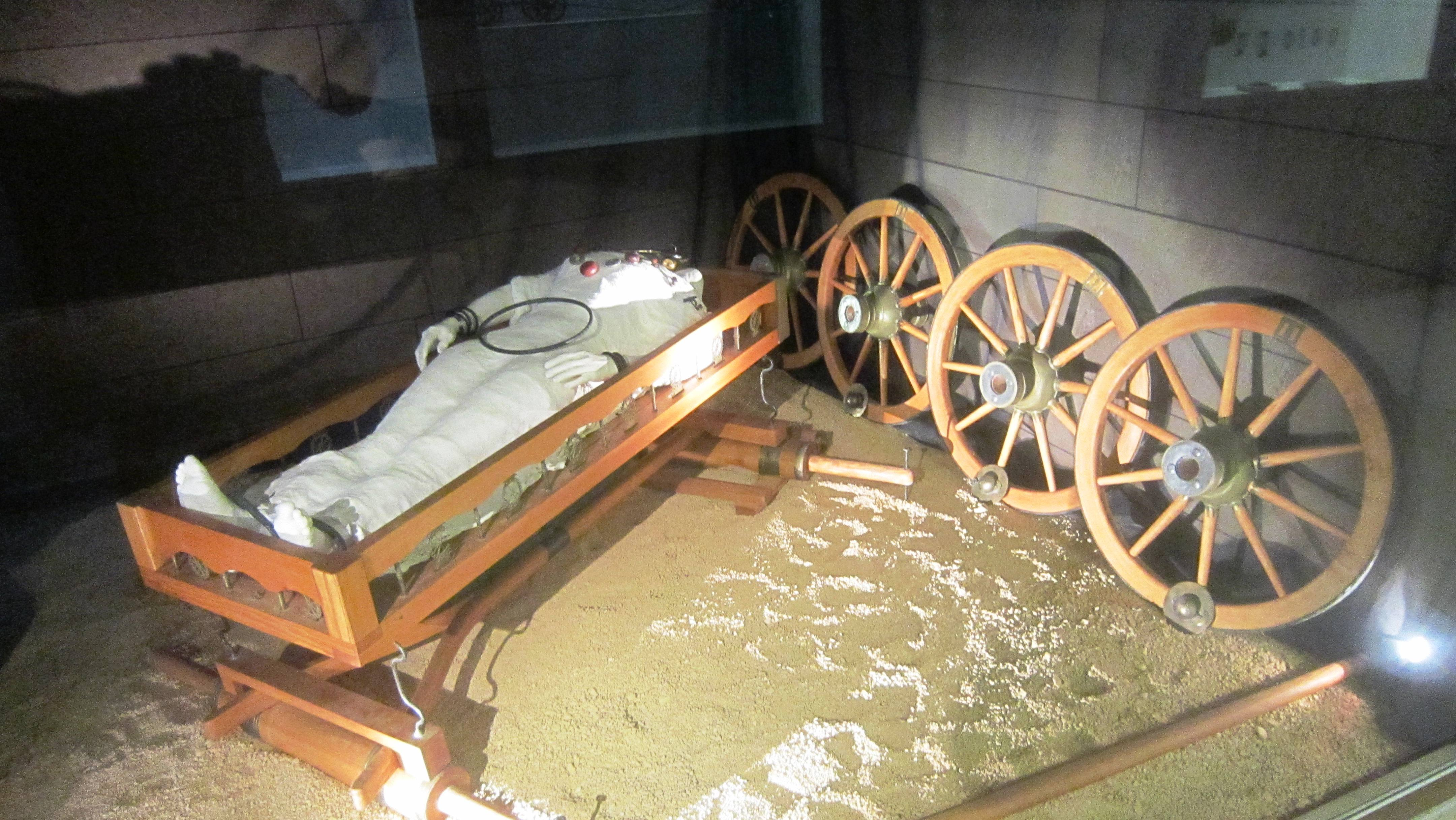 Mobilier de la tombe de Vix, au pied du Mont Lassois (Musée du châtillonnais)